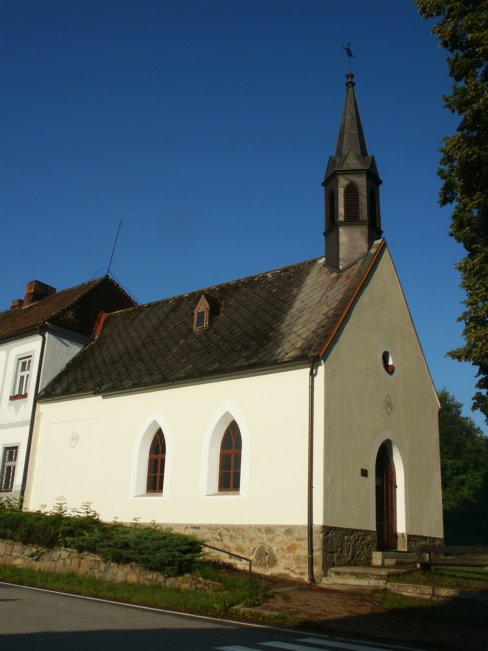 Studánky - Kaple zasvěcená našemu spasiteli